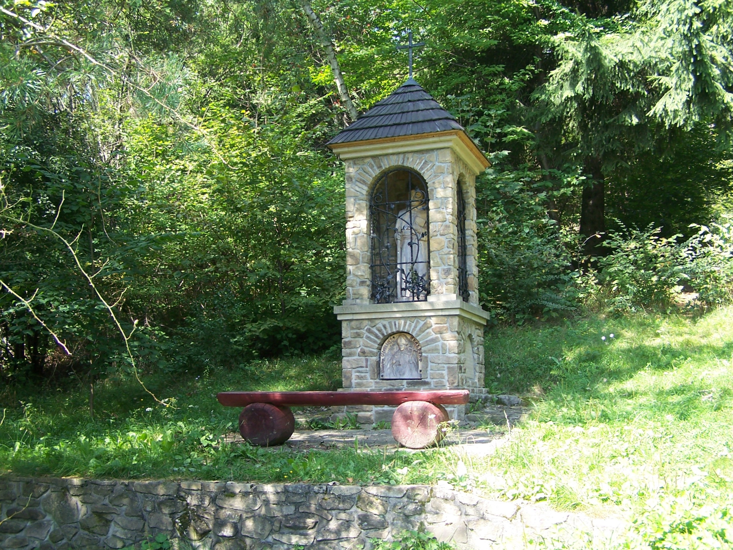 Figurka Bernarda pod wierzchołkiem Patryji w Paśmie Lubomira i Łysiny